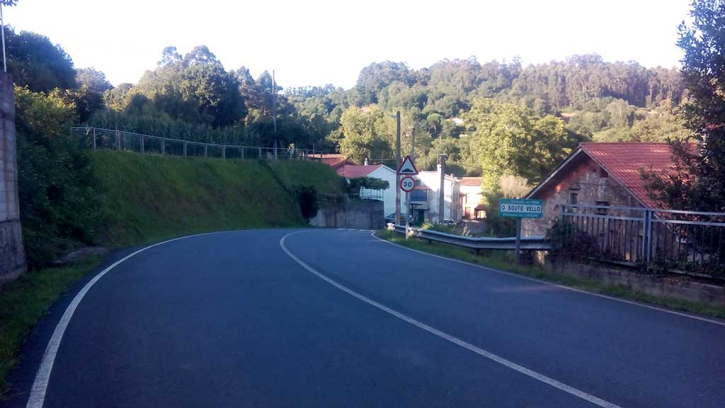 Vista do Souto Vello, Fene.